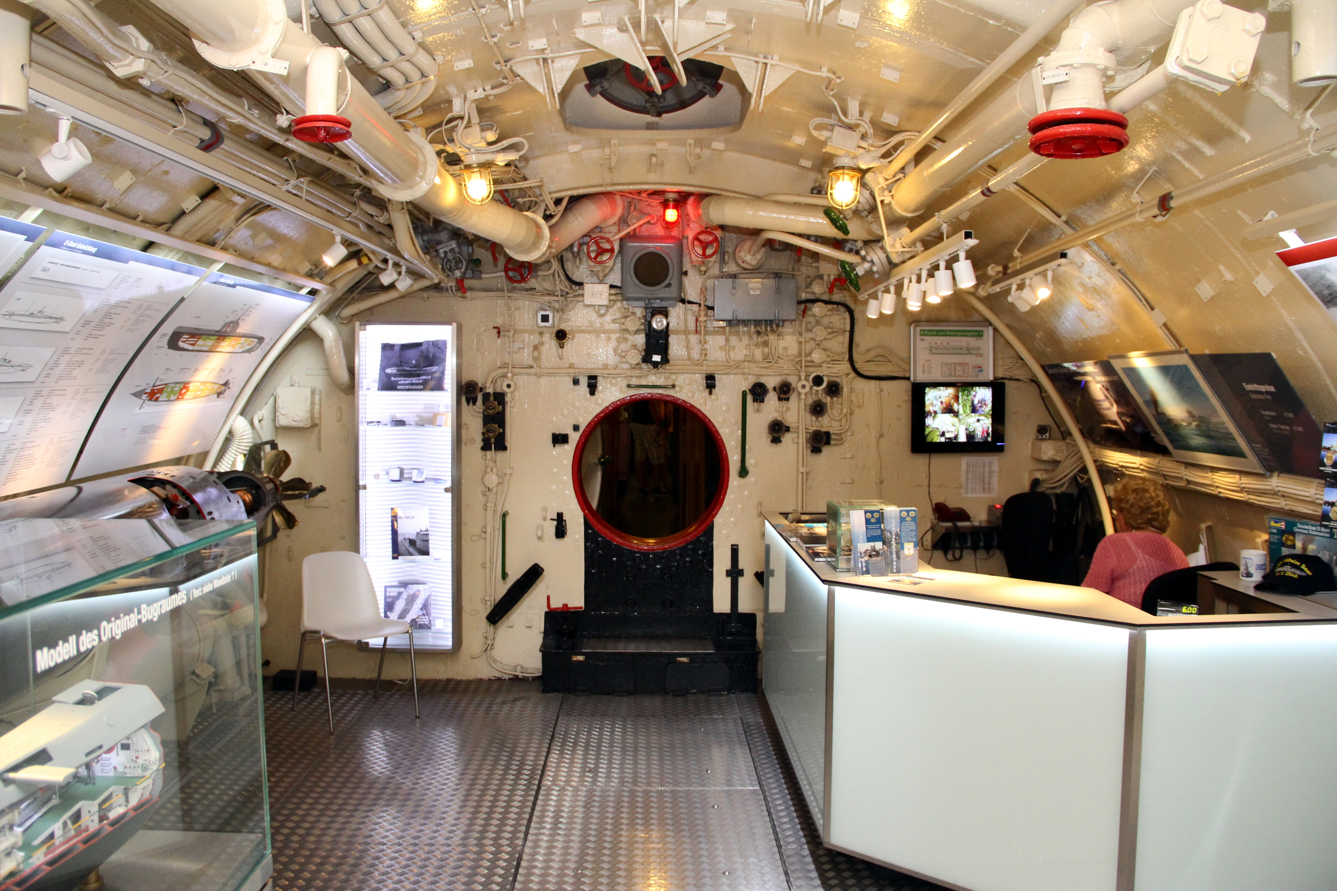 U-Boot Typ XXI U-2540 ("Wilhelm Bauer")